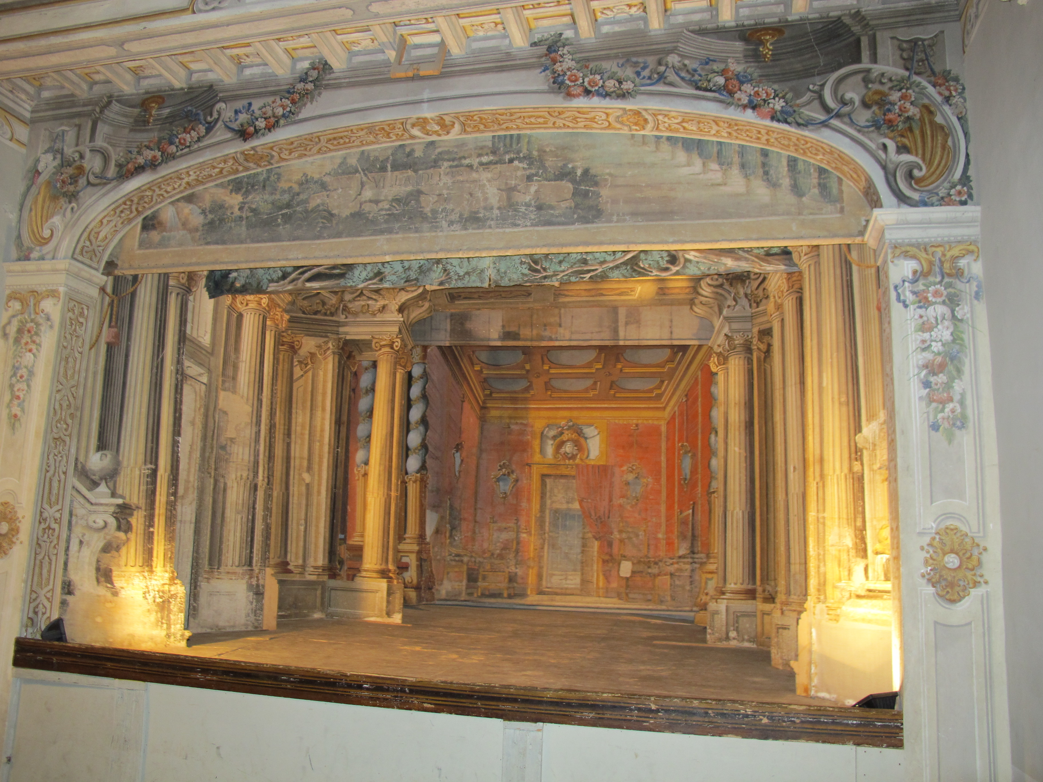 Castello di meleto, interno, teatrino